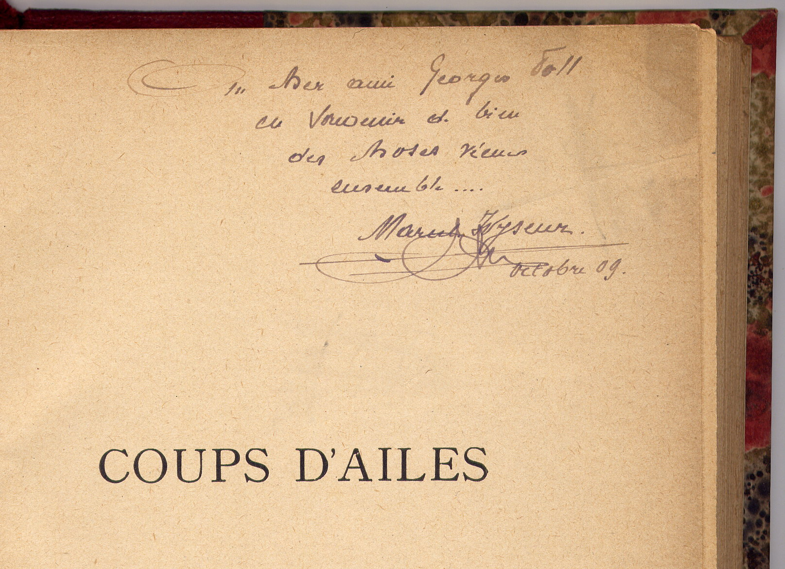 Dédicace du poète Marcel Wyseur (1886-1950) à Georges Poll, page de garde du recueil de poésie "Coups d'ailes"